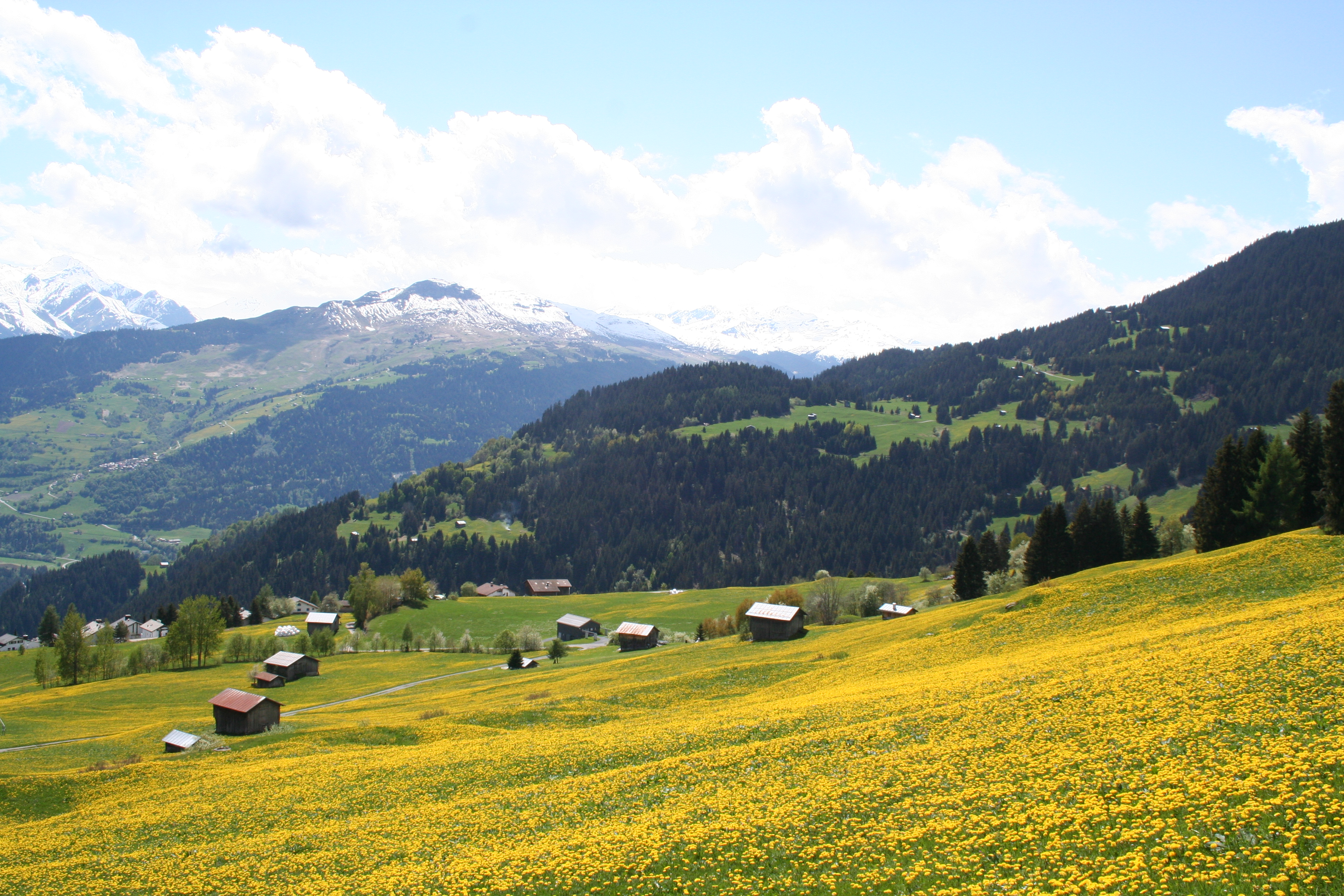 Piz Mundaun